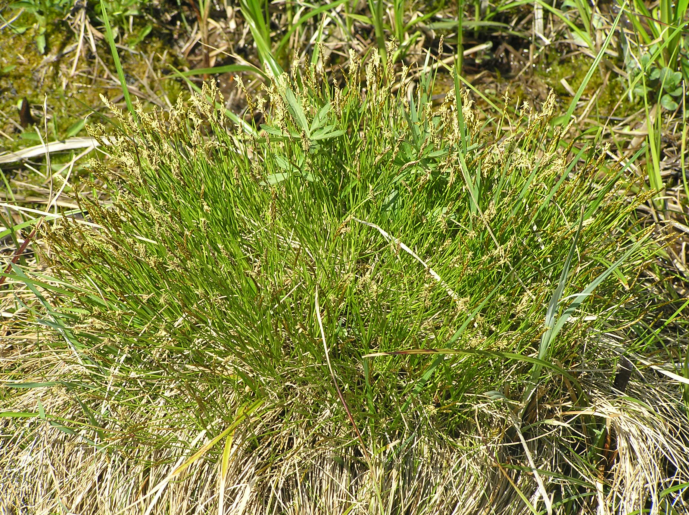 Carex davalliana, Březová, Bílé Karpaty Mountains, Czech Republic